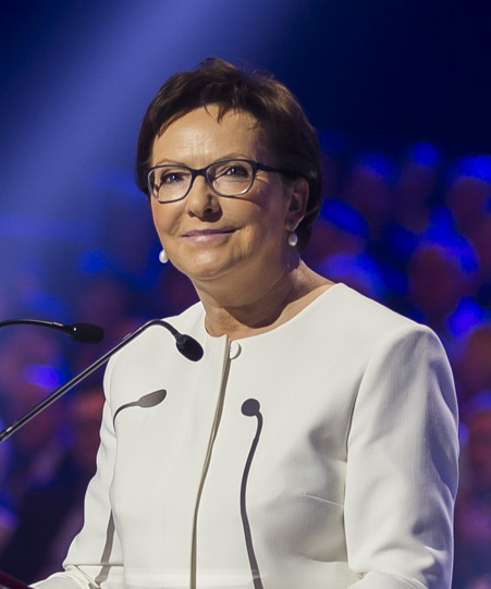 Prezes Rady Ministrów Ewa Kopacz podczas Konwencji PO w Warszawie